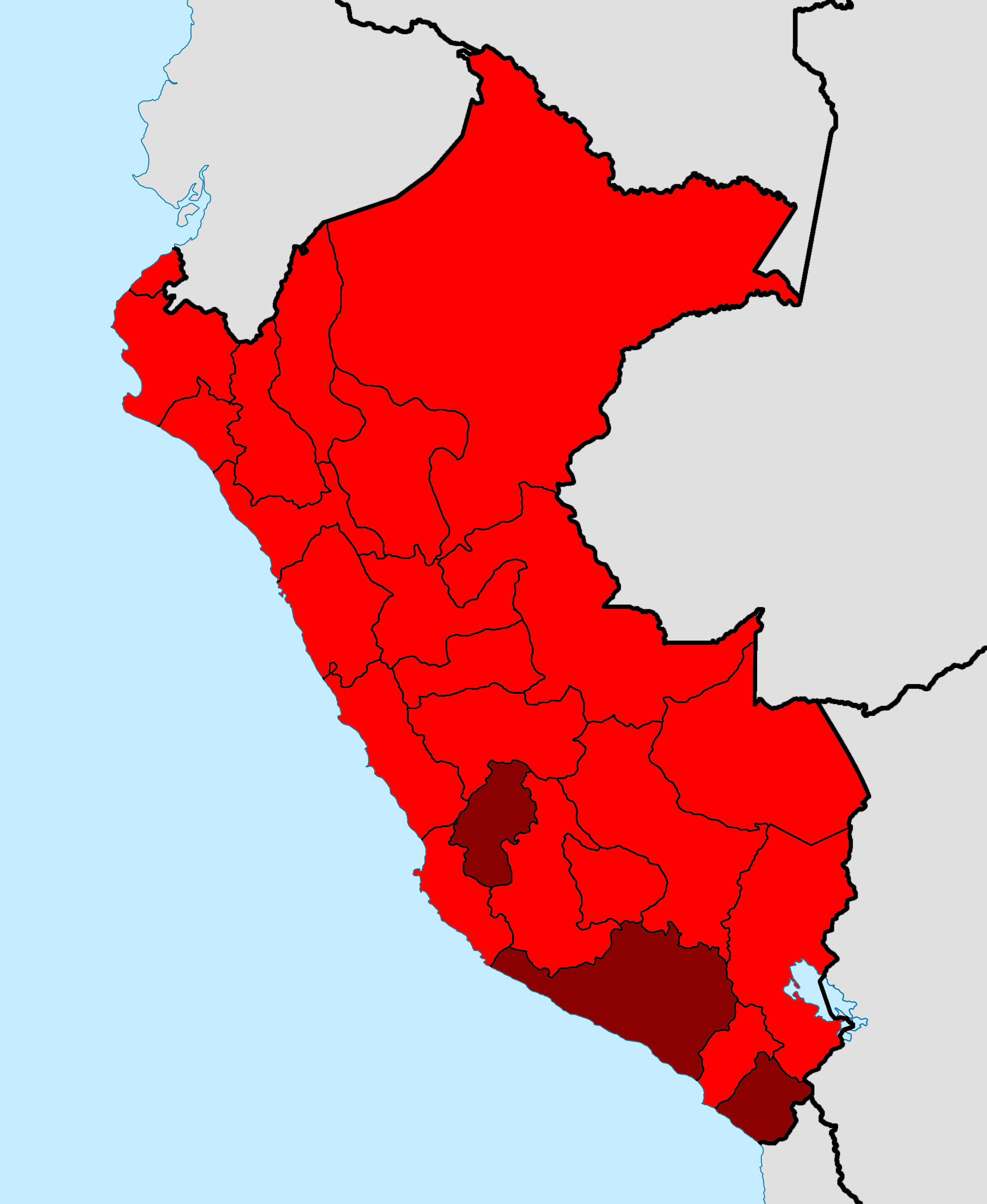 Candidato vencedor por departamento: en rojo APRA, en rojo oscuro Izquierda Unida